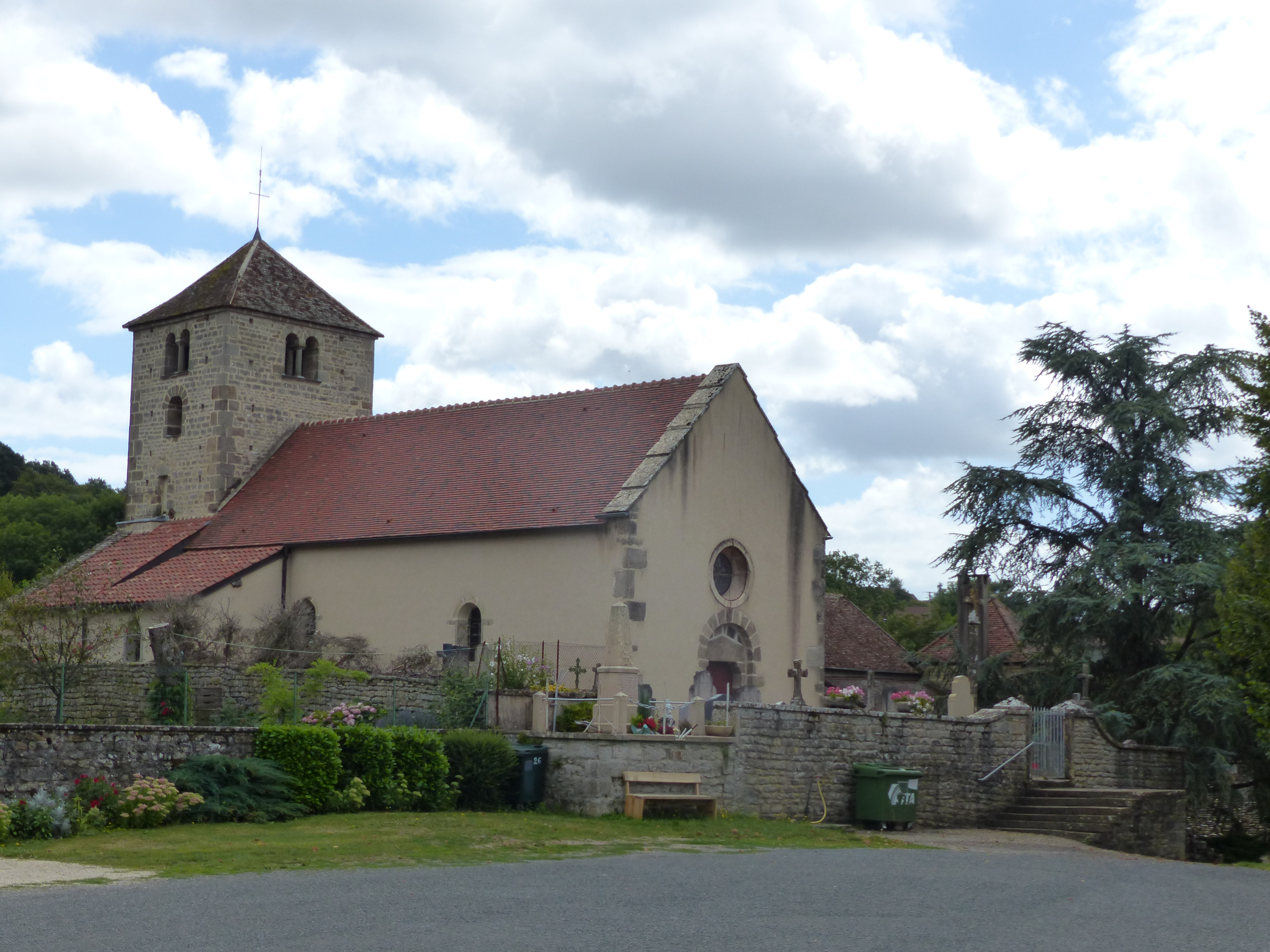 L'église de Burzy (71)